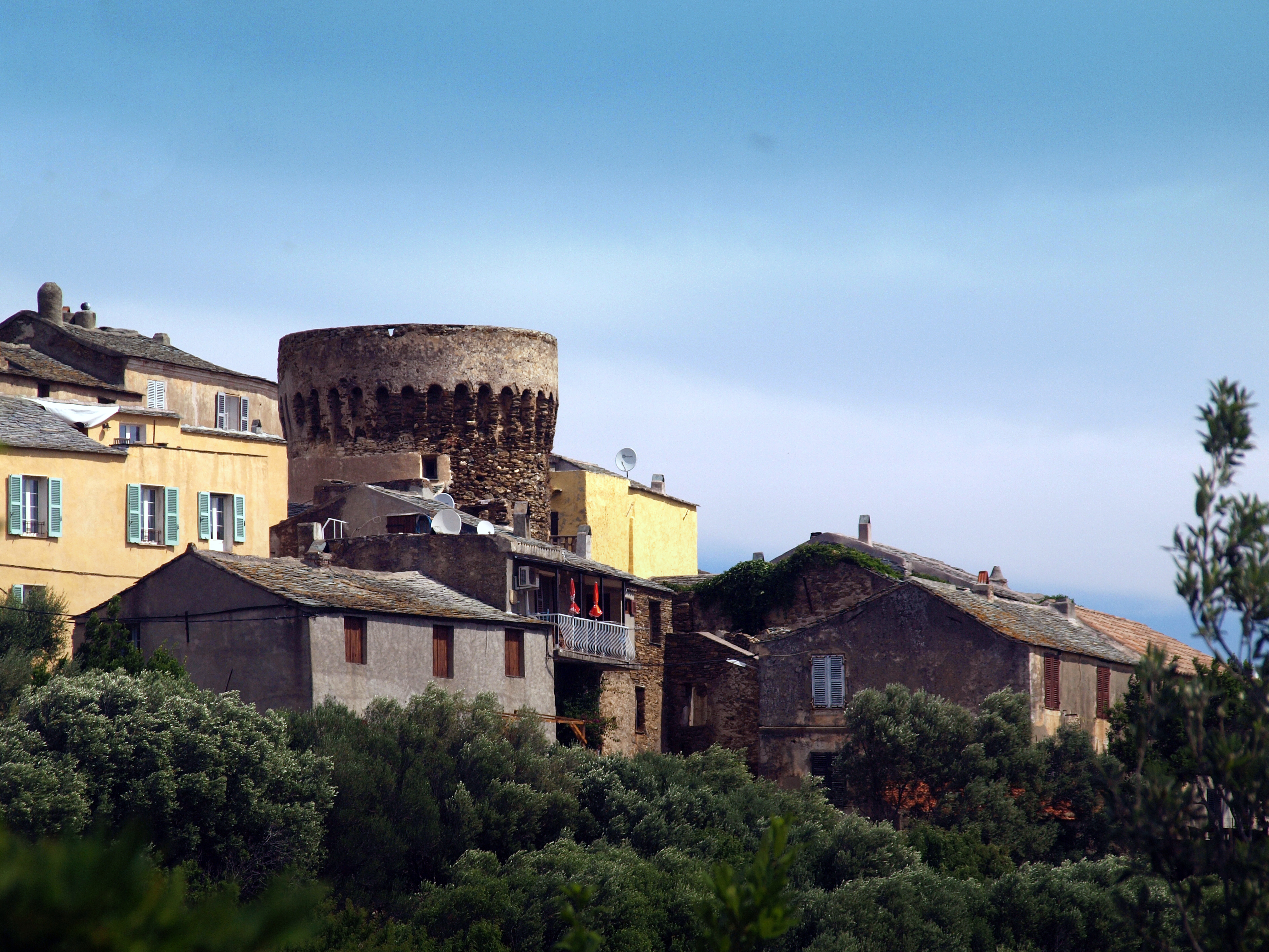 Ersa (Corse) - Tour génoise de Poggio